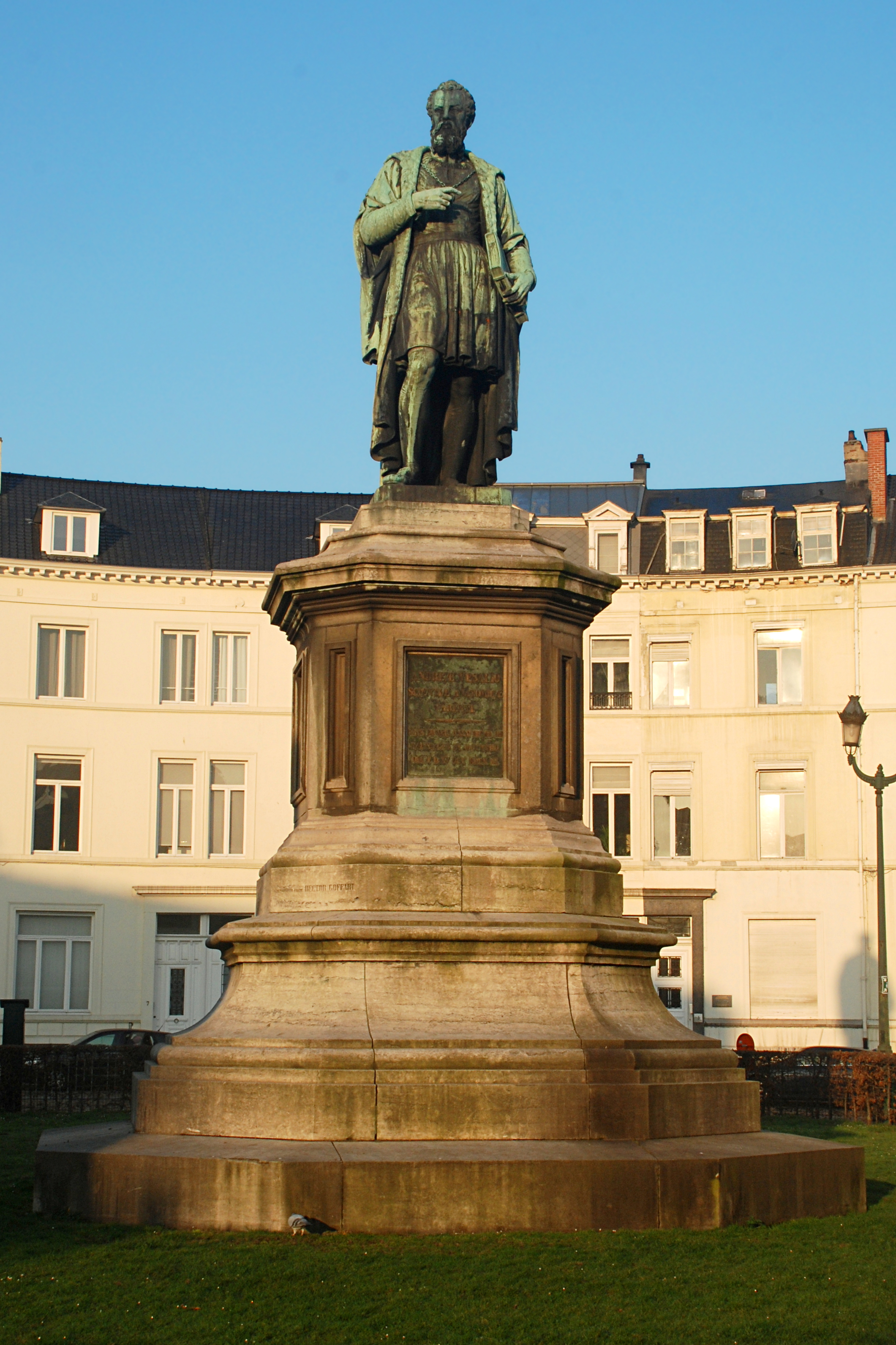 Belgique - Bruxelles - Place des Barricades - Statue d'André Vésale (Joseph Geefs, 1846)